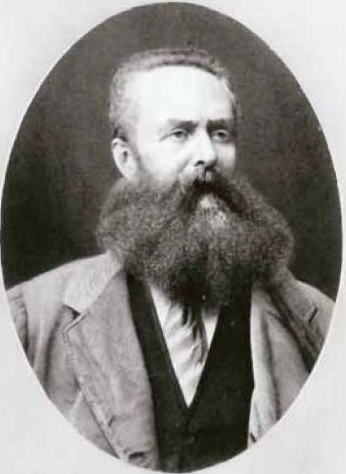 Michel Tyszkiewicz, né le 4 décembre 1828 à Wolozyn en Lituanie (aujourd'hui en Biélorussie) dans une famille des magnats polonais, mort le 18 novembre 1897 à Rome, est un grand collectionneur d'antiquités et fondateur d'un musée privé à Rome.